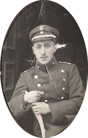 ppor. Józef Mickiewicz [Polskie Siły Zbrojne 1918 r.]